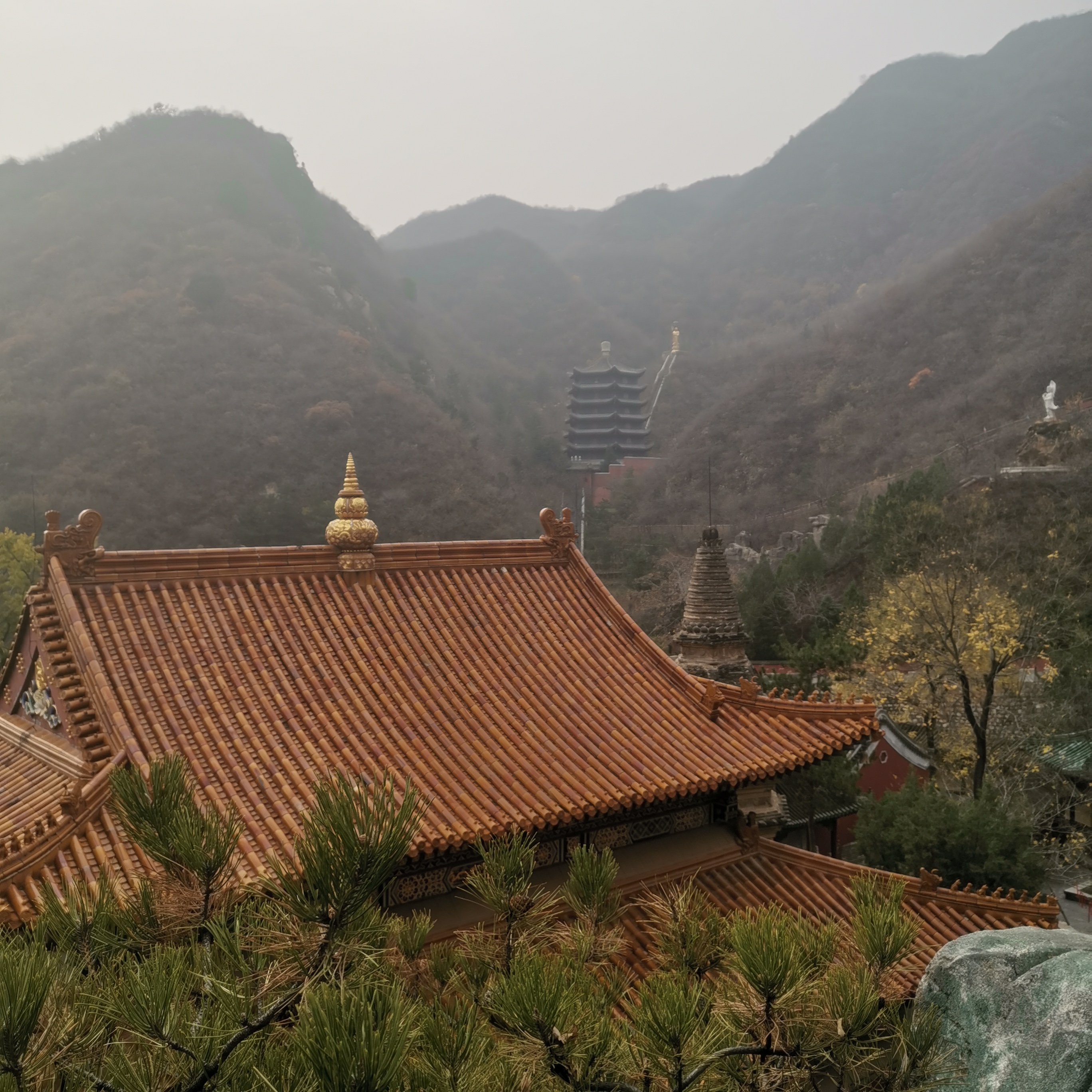 中文（中国大陆）: 白瀑寺